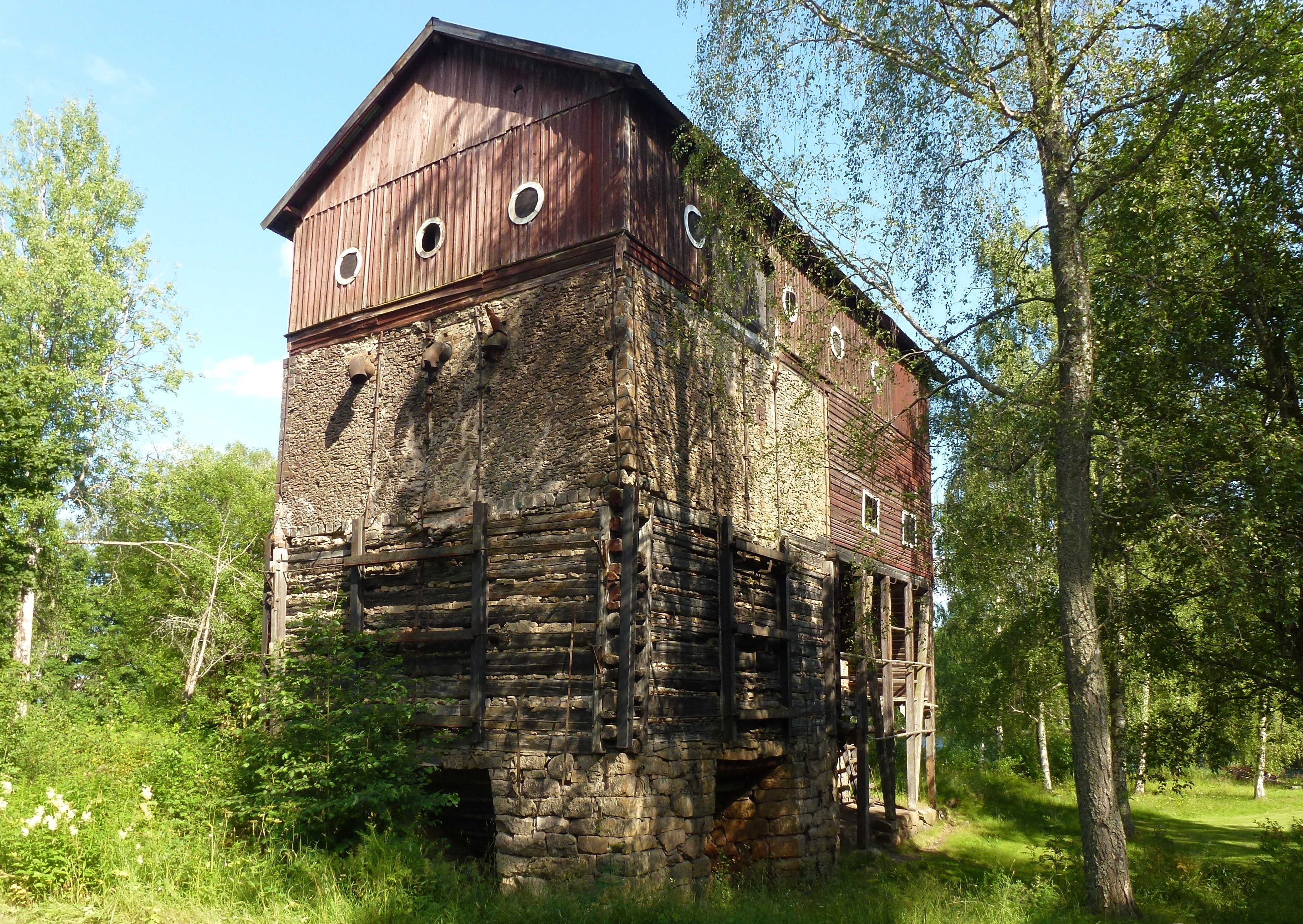 Norns hytta 2012